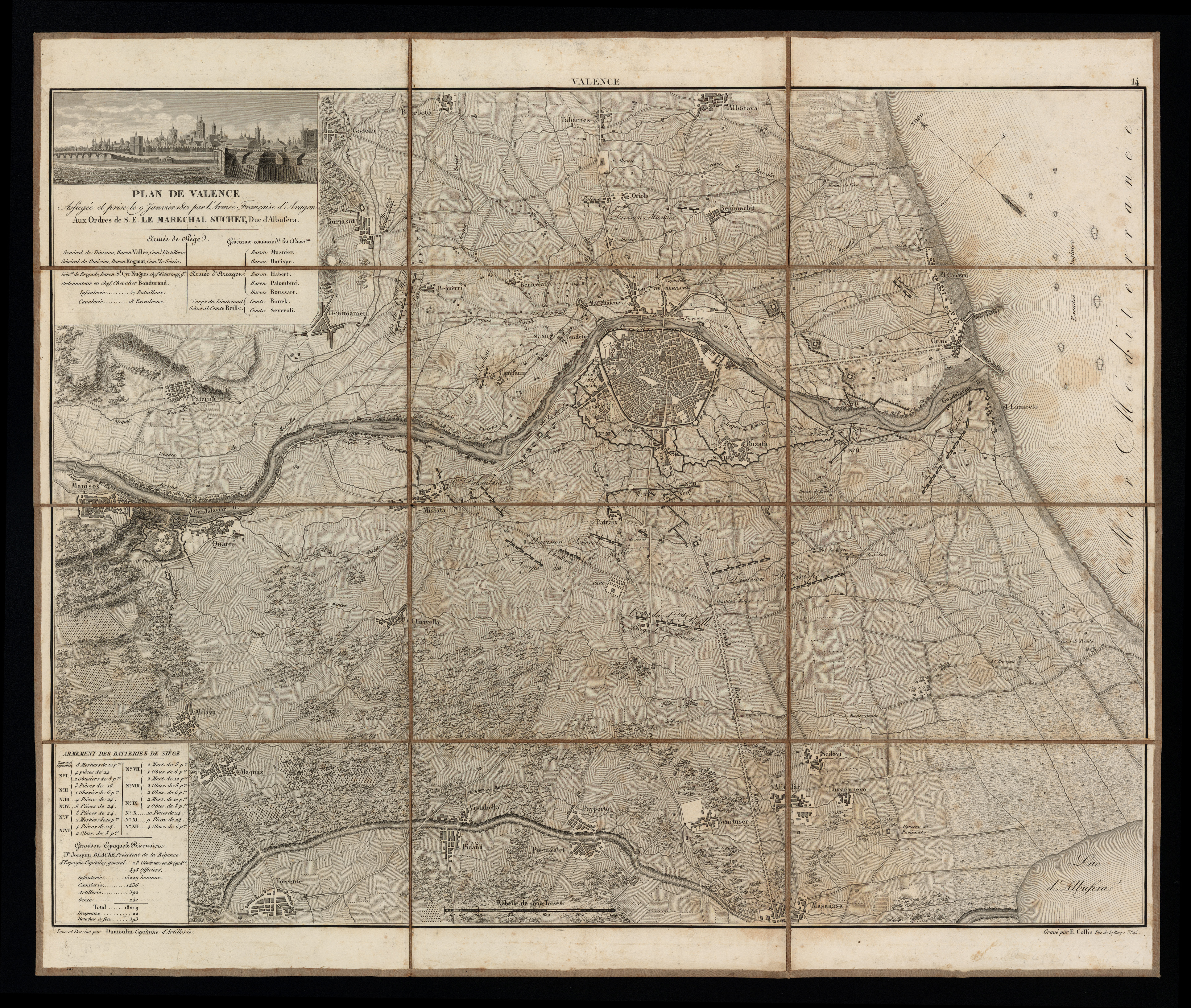 Plànol de València, assetjada i presa el 9 de gener de 1812 per l'armada francesa d'Aragó, a les ordres del Mariscal Suchet, duc d'Albufera.